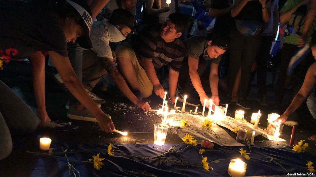 Protestas en Managua, Nicaragua de 2018